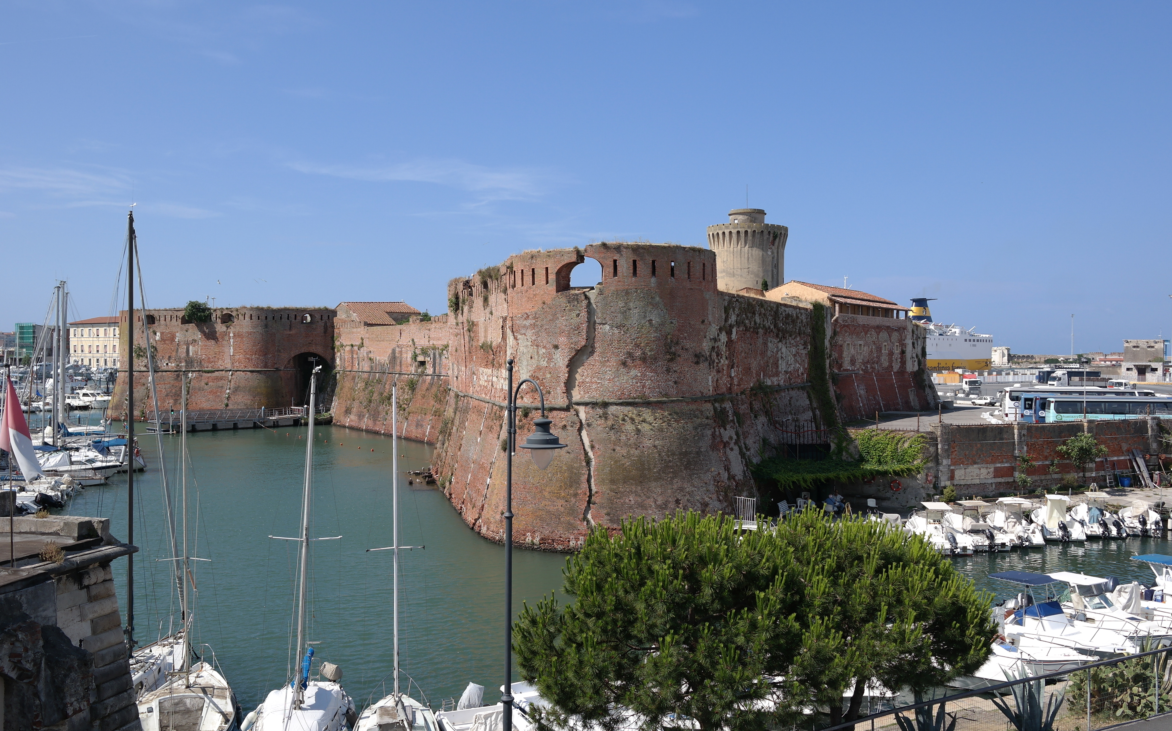 Fortezza Vecchia a Livorno vista dal Ponte di Santa Trinità